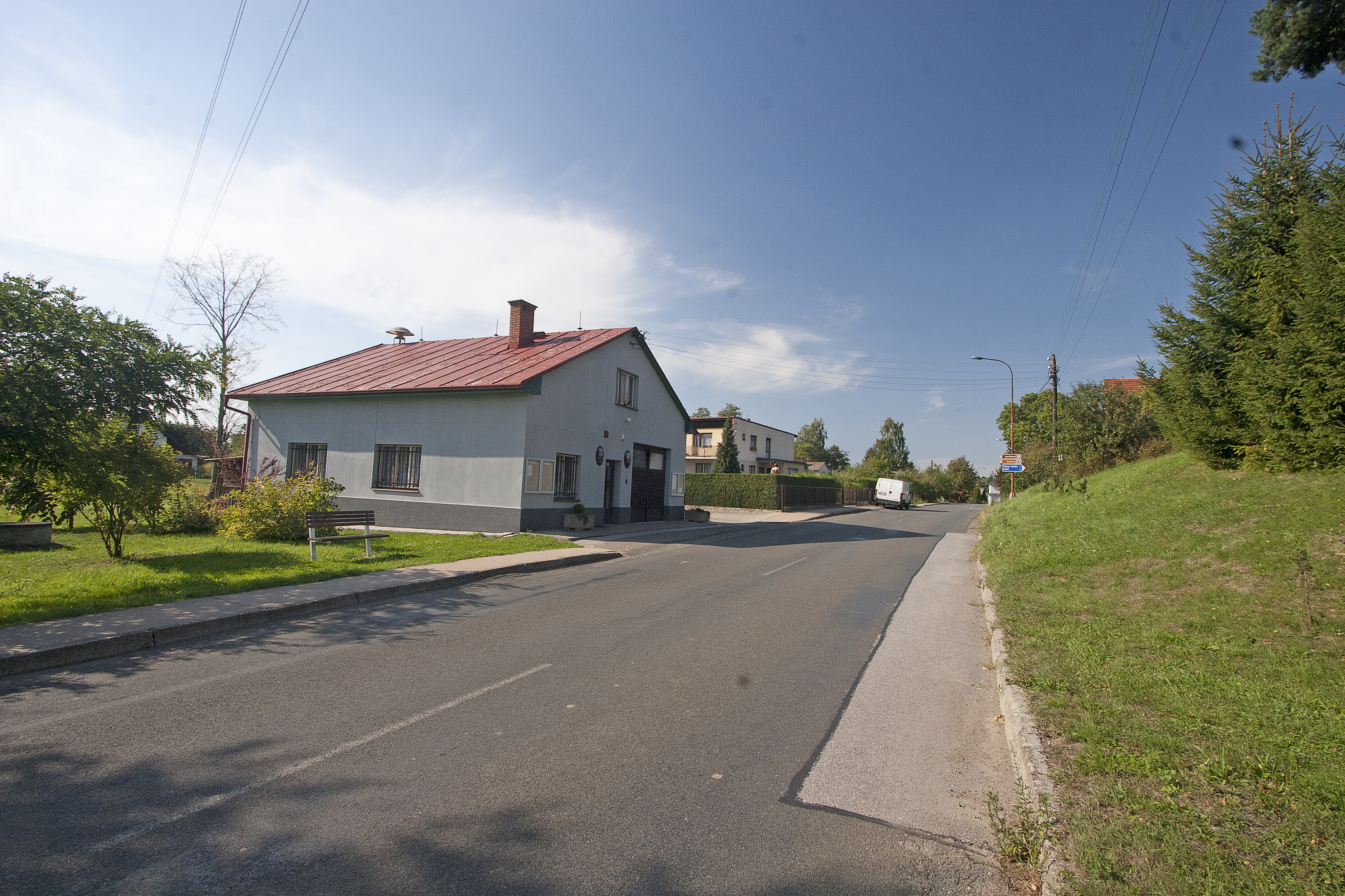 Lukavec u Hořic obecní úřad